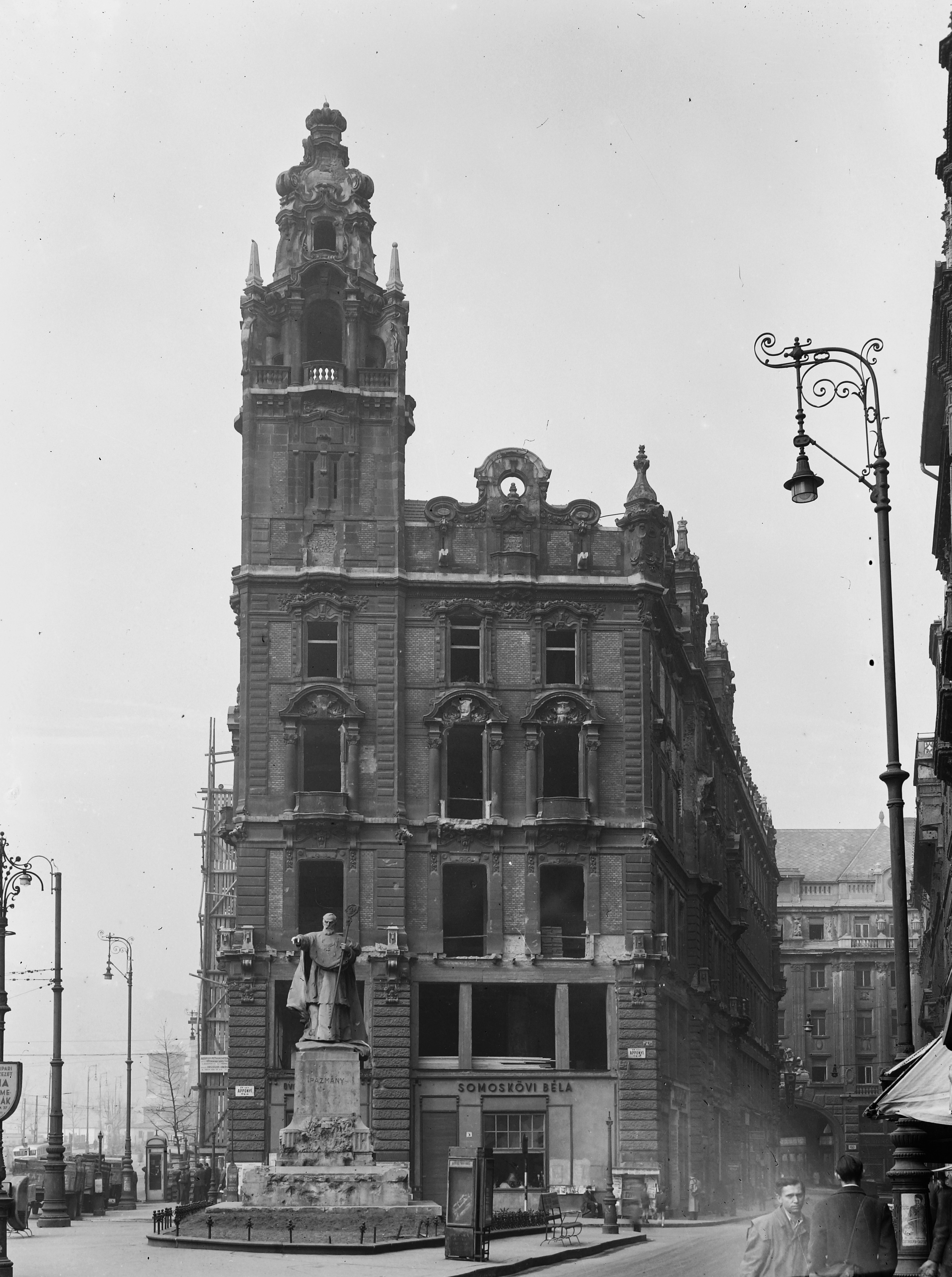 Ferenciek tere (Apponyi tér), Klotild palota, jobbra a Kígyó utca. Location: Hungary, Budapest V. Tags: sculpture, sign-board, damaged building, war damage, Péter Pázmány-portrayal, Budapest Title: Ferenciek tere (Apponyi tér), Klotild palota, jobbra a Kígyó utca.